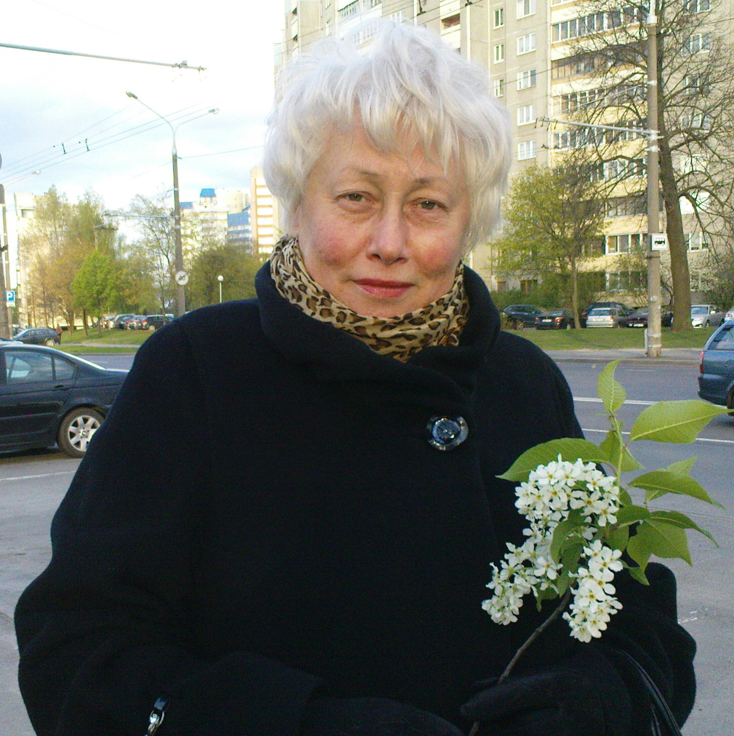 Горелова Галина Константиновна (2015)